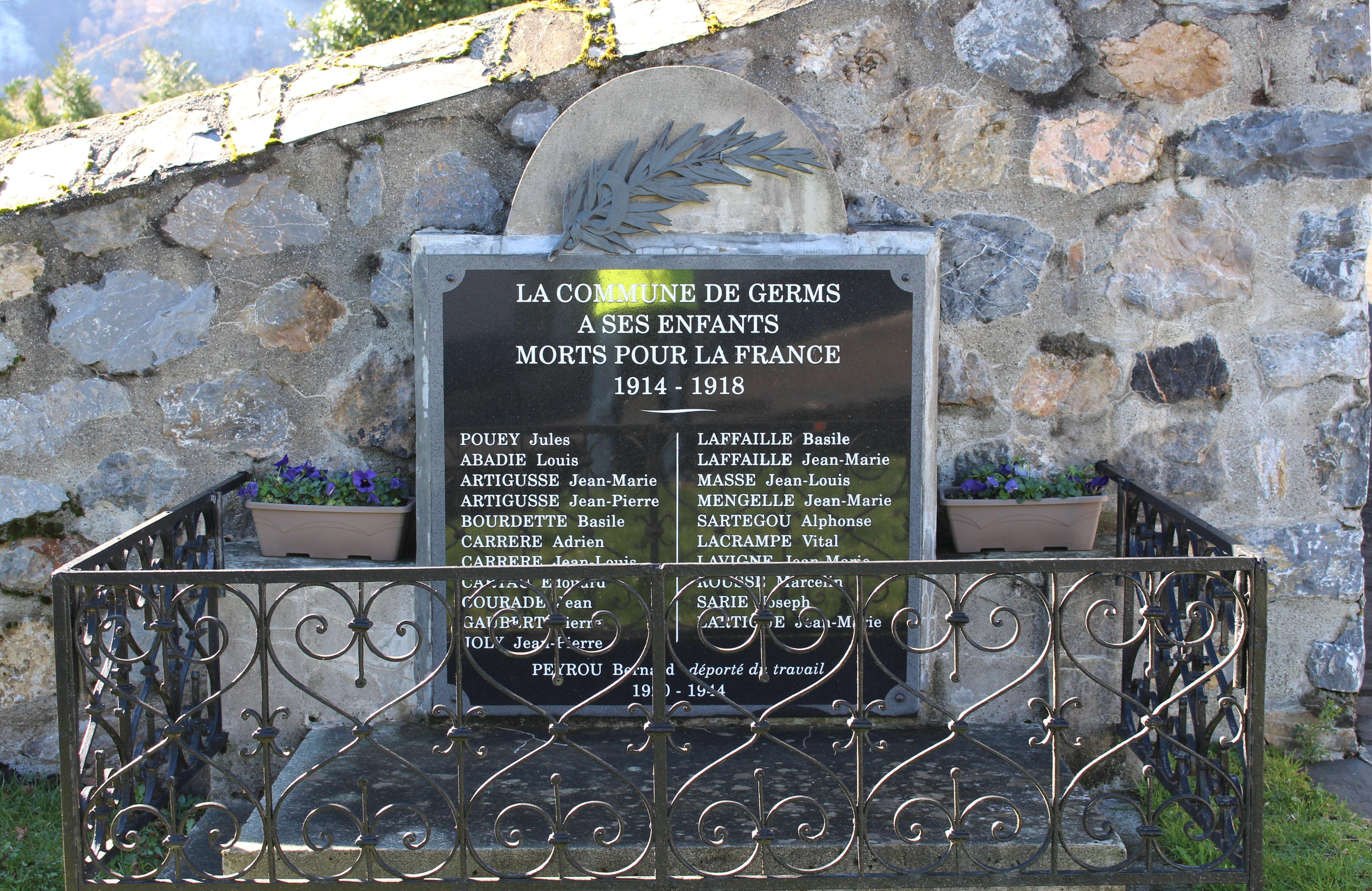 Monument aux morts de Germs-sur-l'Oussouet (Hautes-Pyrénées)